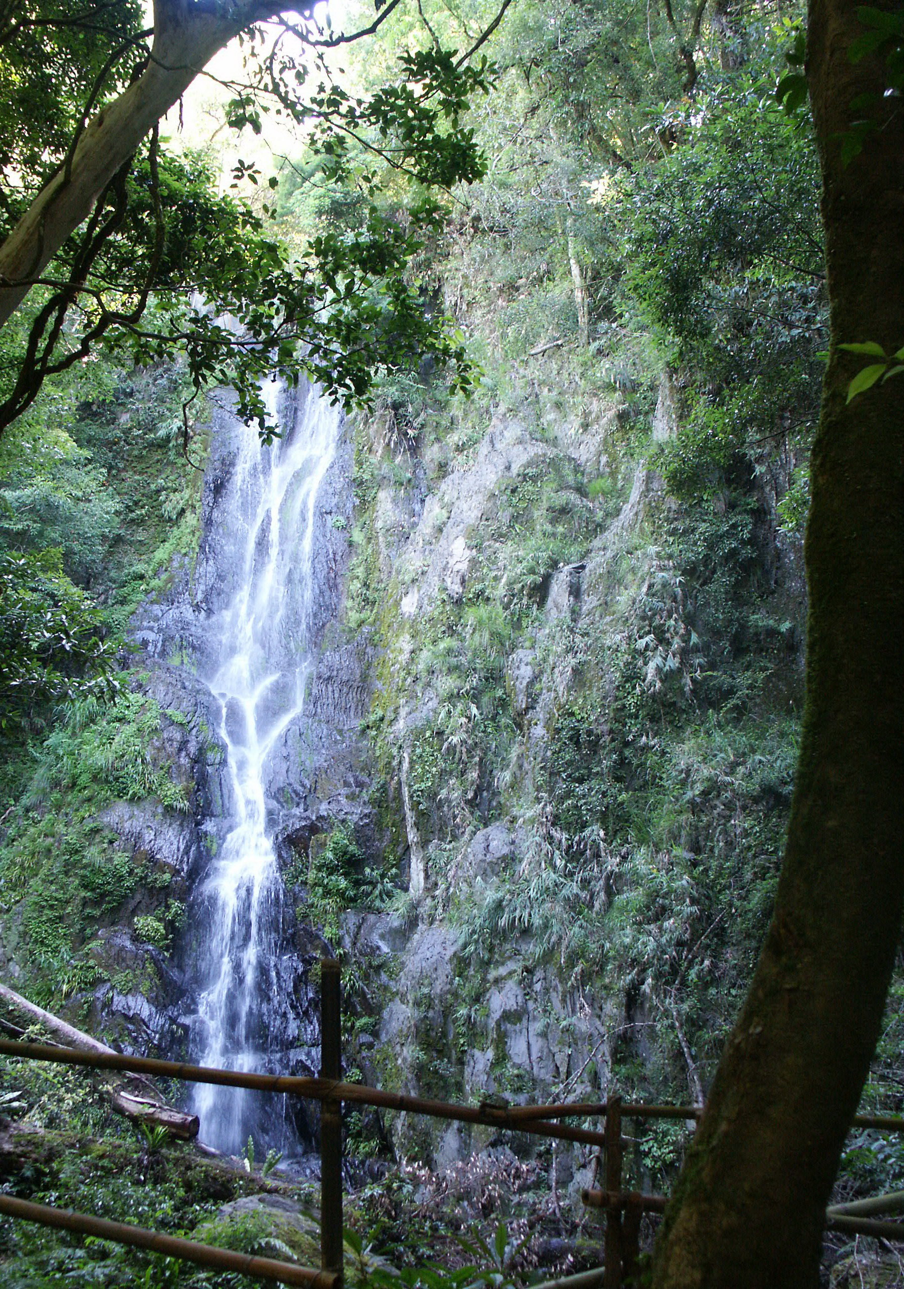 Serifu Waterfall 司立富瀑布